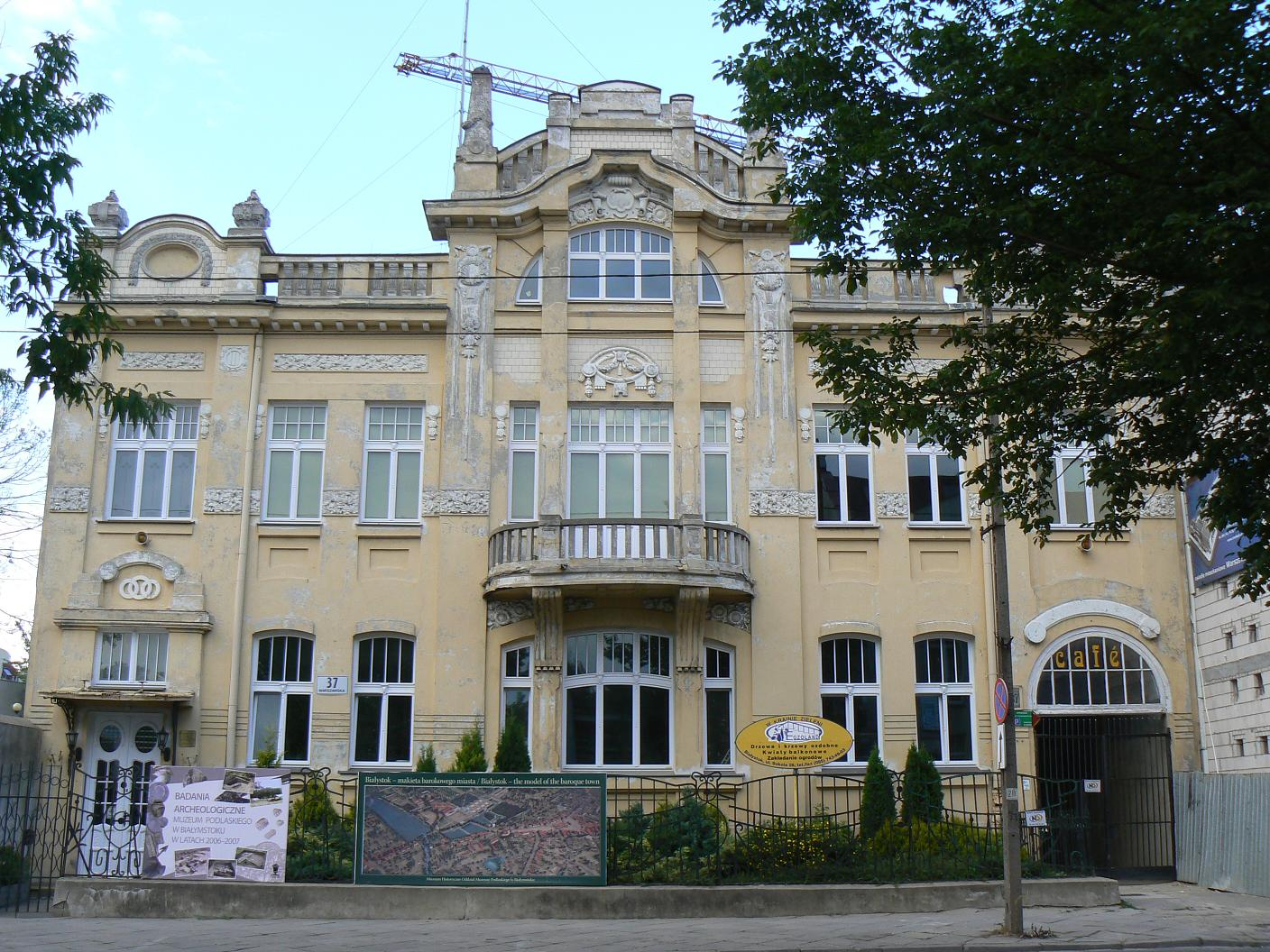 Białystok, ul. Warszawska 37 - "Pałac Citronów" - kamienica i oficyna z ogrodzeniem, obecnie siedziba Muzeum Historycznego (zabytek nr A-164 z 8.04.1978)